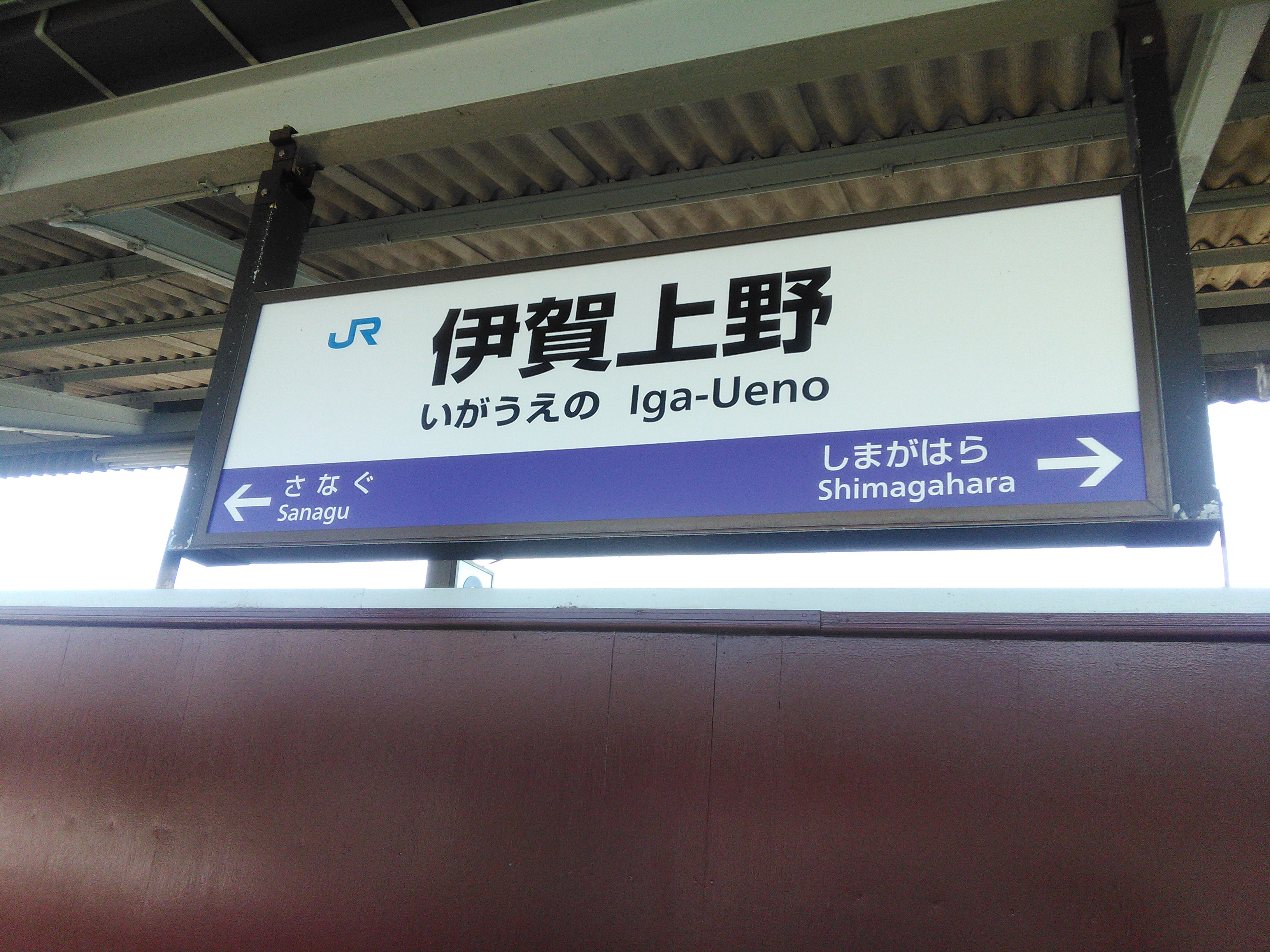 伊賀上野駅4番のりばの駅名標